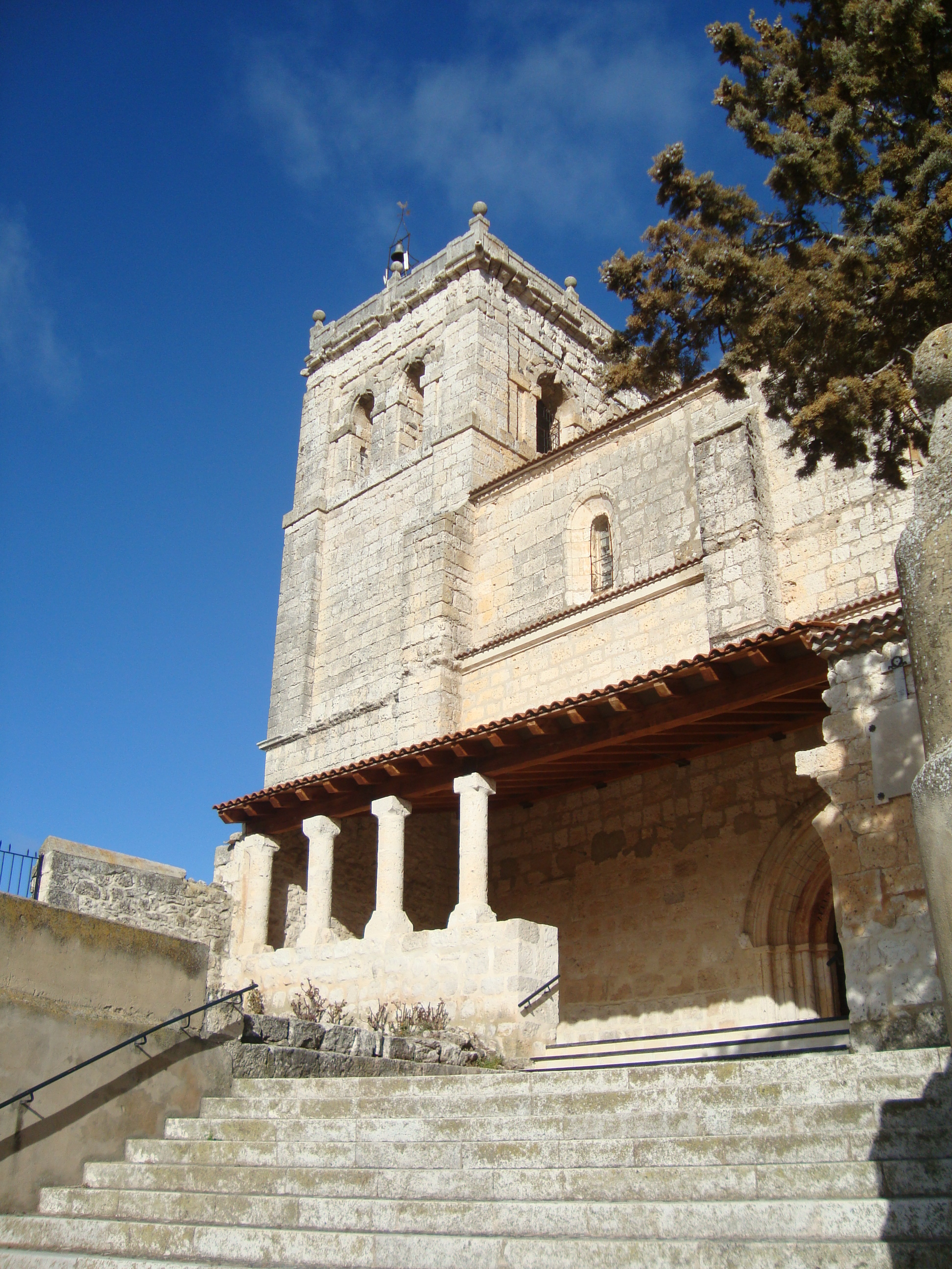 Vista de la iglesia de San Juan Ante Portam Latinam, parroquial de Piñel de Arriba (Valladolid).